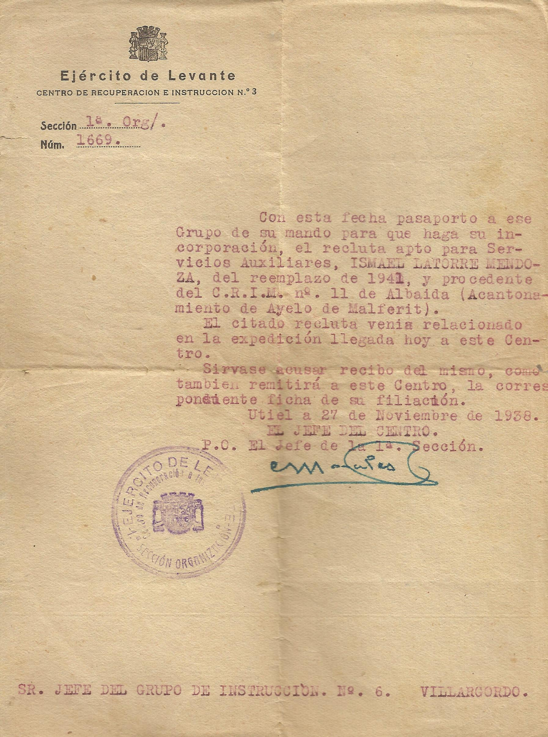 Projecte de col·laboració de l'Arxiu Ismael Latorre Mendoza amb Wikimedia Commons i Amical Wikimedia.